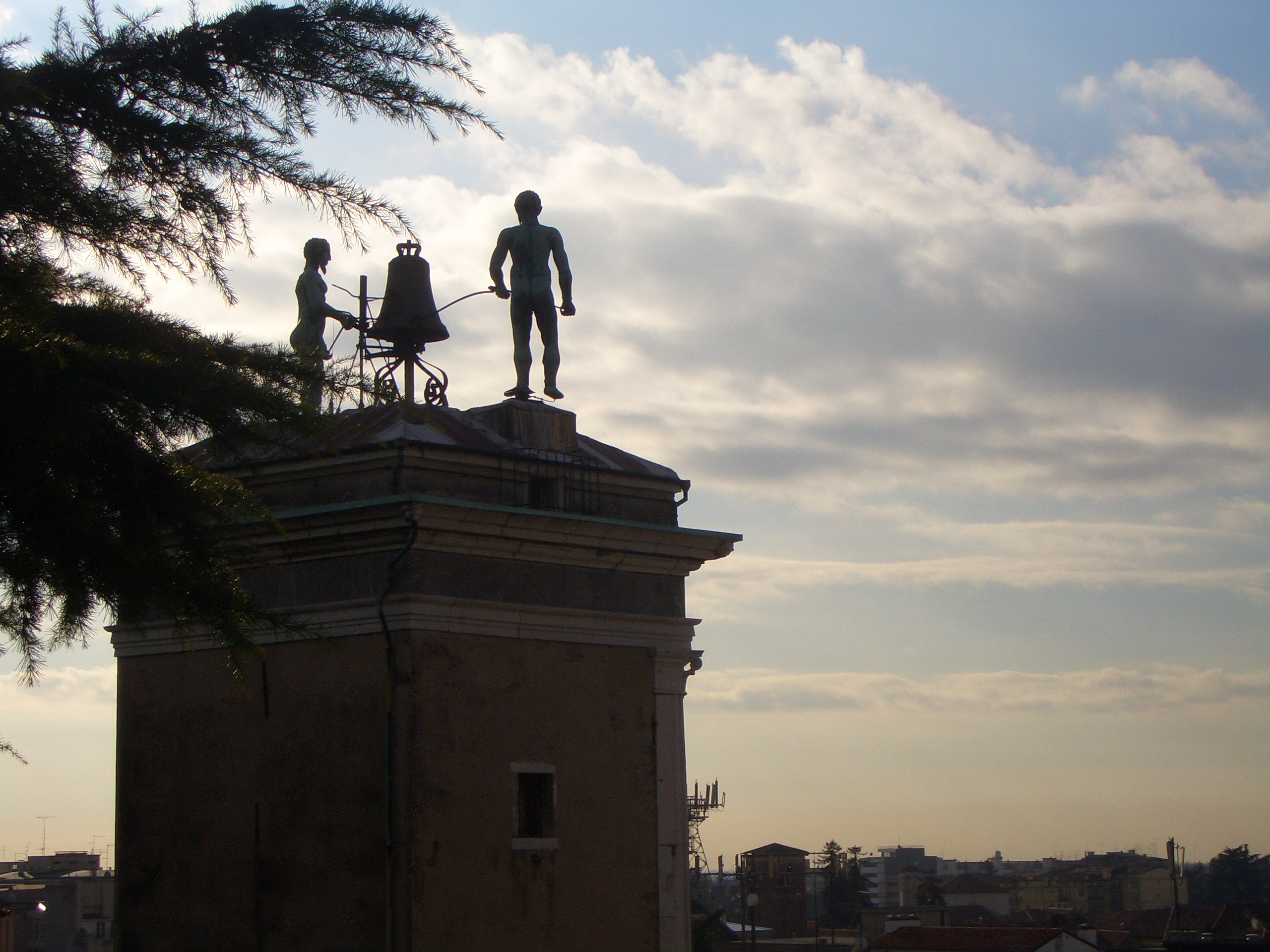 Blick vom Aufgang zum Schlossberg in Udine auf die Stadt